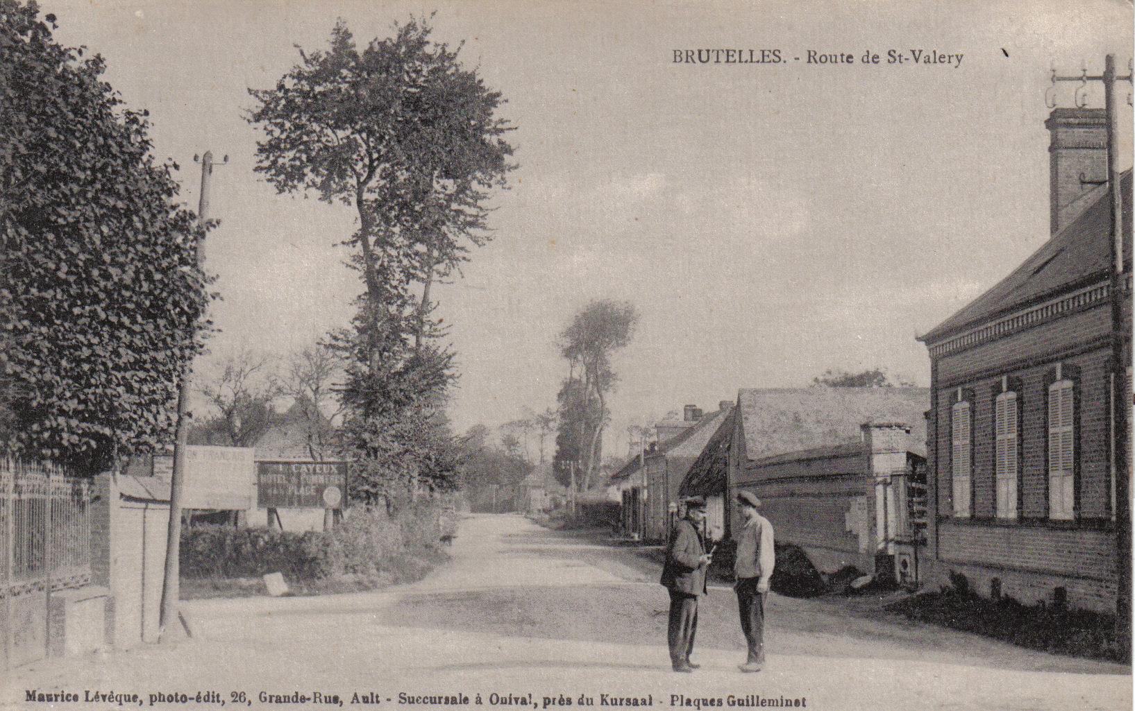 "Route de St Valery"